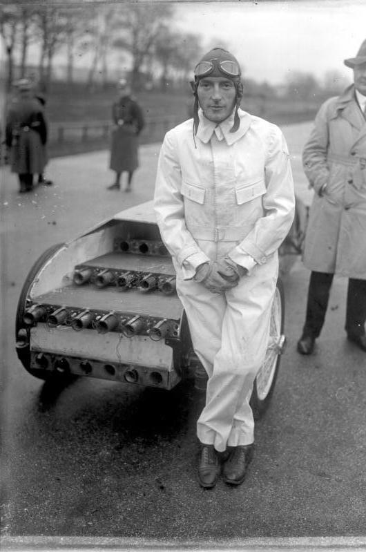 Der deutsche Ing. Volkhardt! welcher mit seinem Raketenauto auf dem Nürburgring erfolgreich startete. Der Ing. Volkhardt [Volkhart] vor seinem Raketenauto.